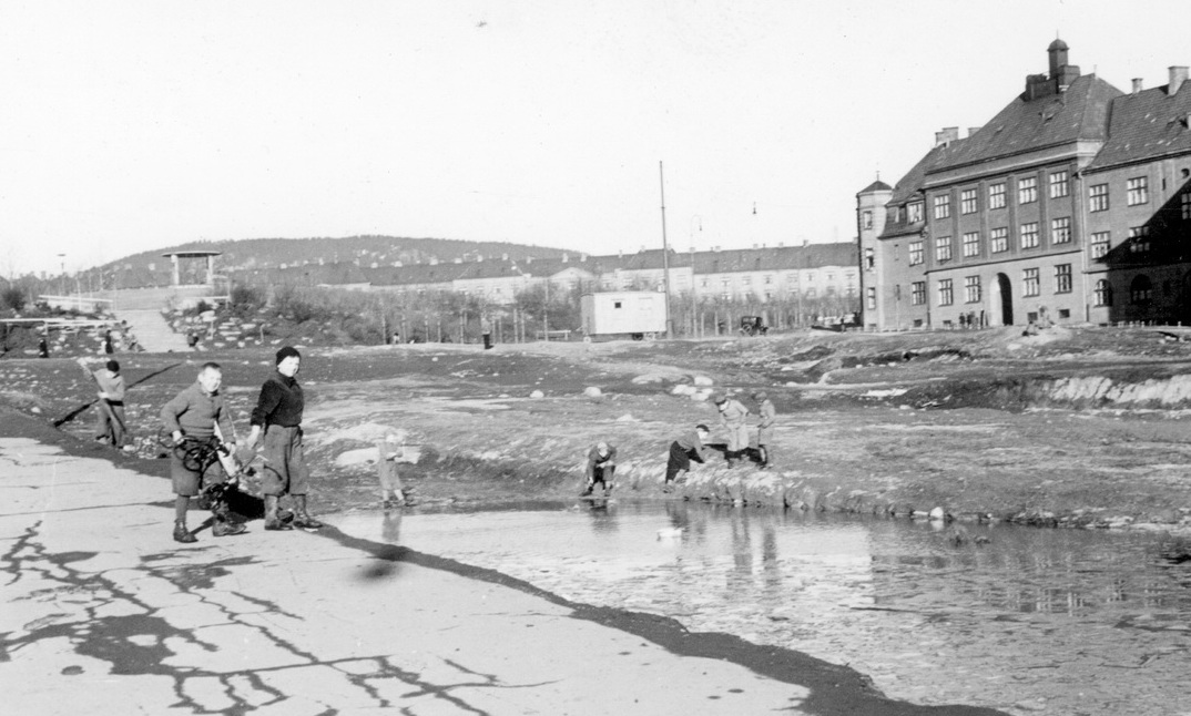 Barn i lek ved en vanndam i sydspissen av Torshovparken (1931), der som Lilleborgbanen (Ballplassen) ligger i dag. Bildet tatt mot nordøst, med musikkpaviljongen på høyden av parken i bakgrunnen. Til høyre bebyggelsen i Ole Bulls gate 43-49. Arbeider, arbeidsbrakke. Opparbeidelse av plassen. Vårløsning.